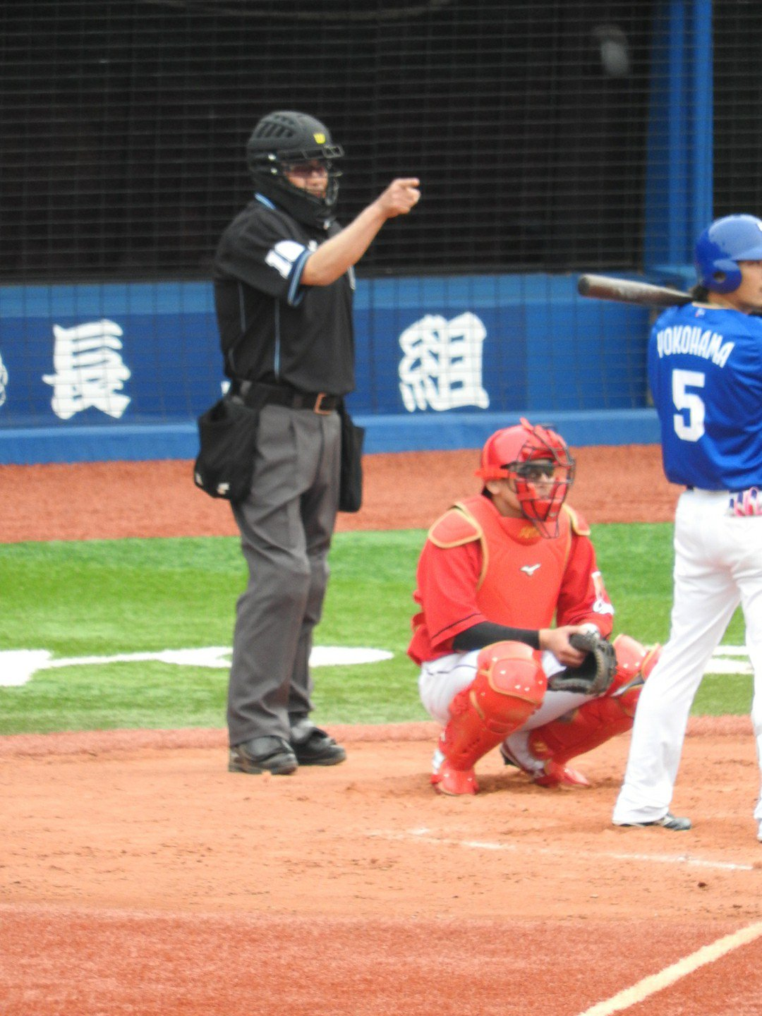 2019年4月14日横浜スタジアムにて